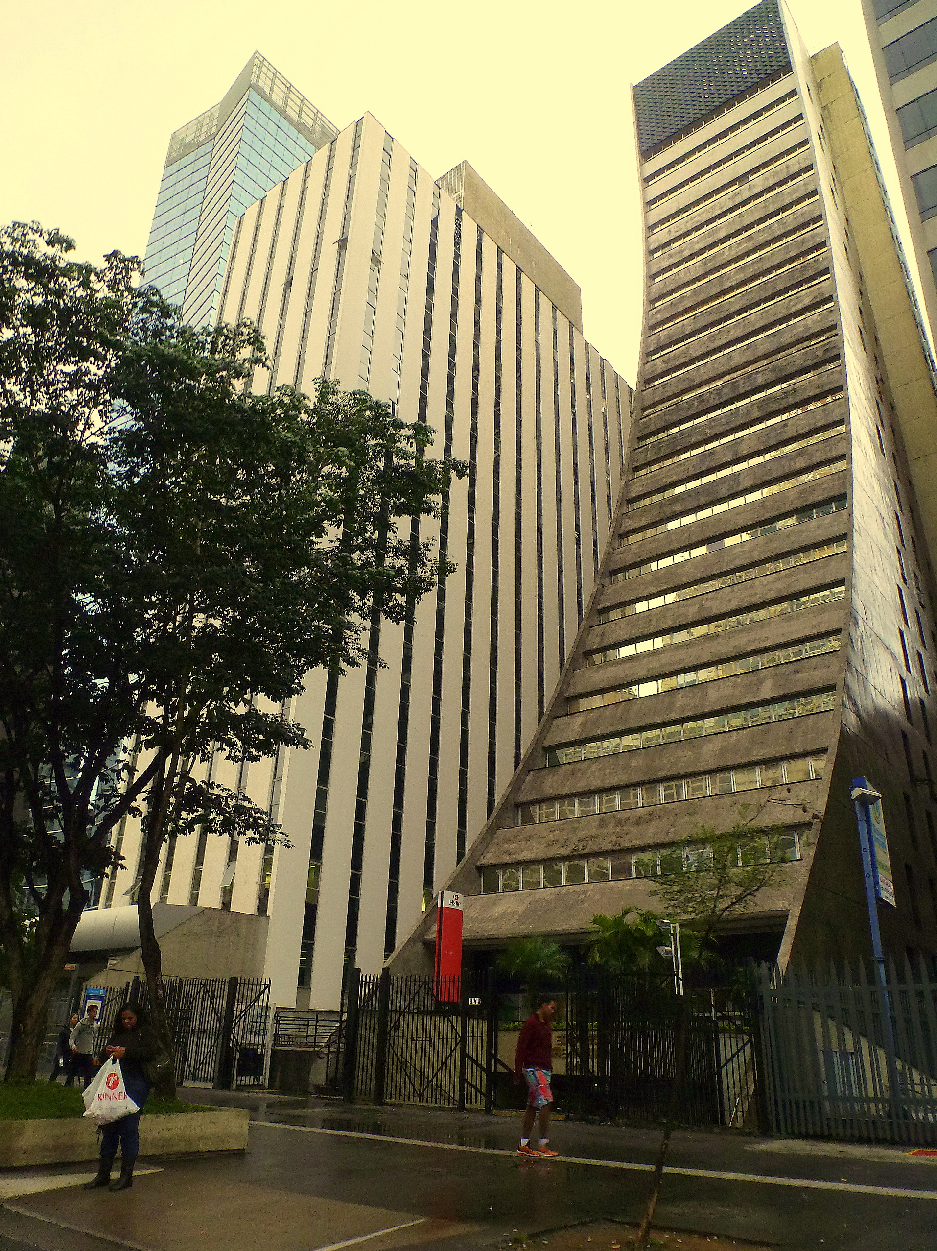 Ed. Torre Paulista em primeiro plano